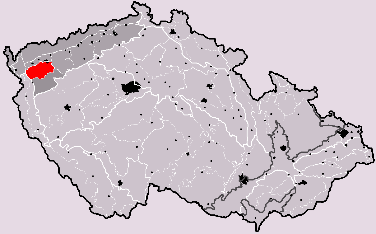 Poloha geomorfologického celku Slavkovský les v rámci České republiky. Hercynský systém Hercynská pohoří I Česká vysočina I3 (III) Krušnohorská subprovincie I3C (IIIC) Karlovarská vrchovina I3C-1 (IIIC-1) Slavkovský les